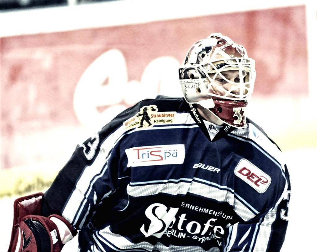 Barry Brust